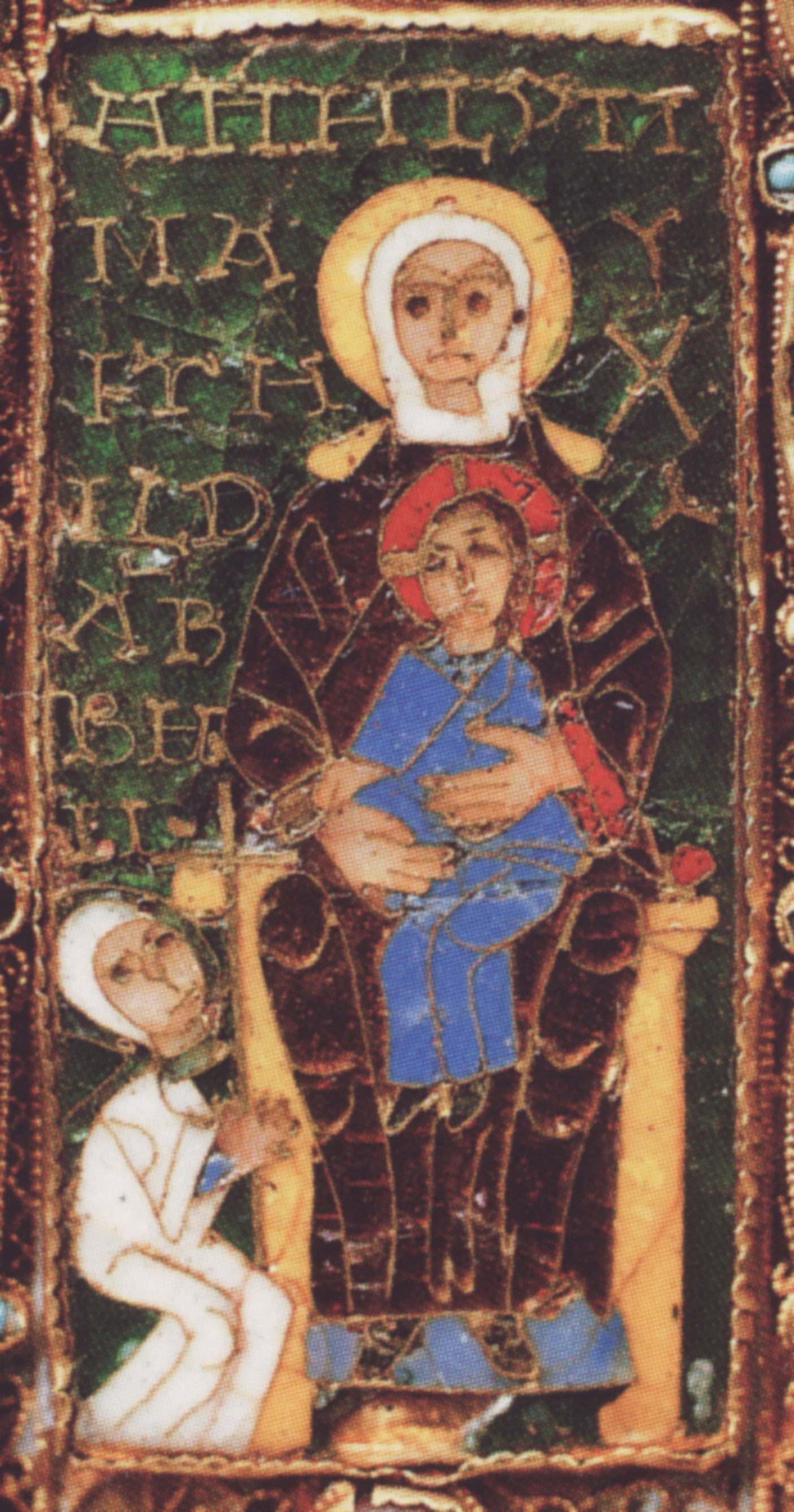 Stifteremail des jüngeren Mathildenkreuzes im Essener Domschatz